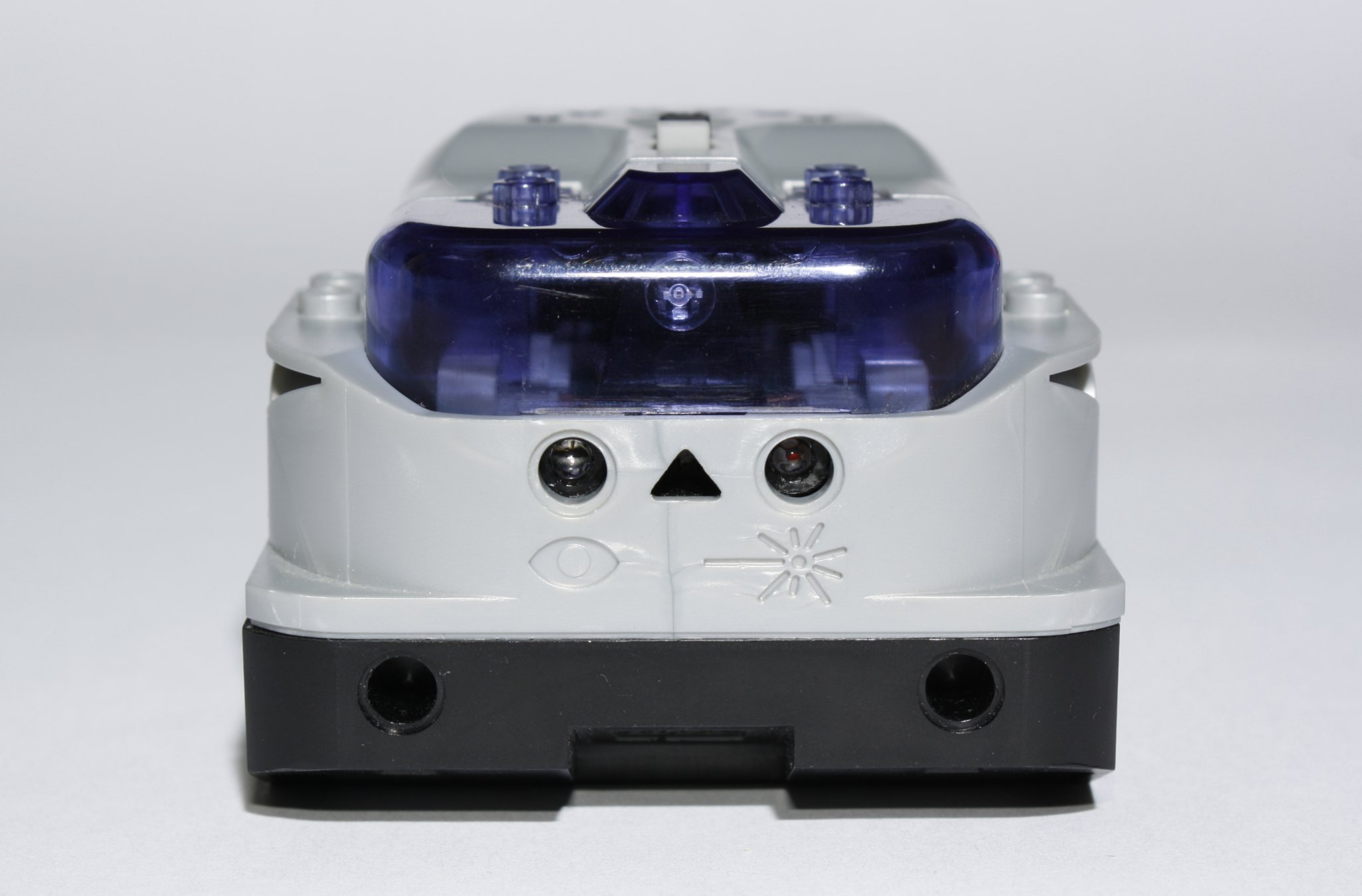 Lego Spybot Hauptbaustein (Rückseite)